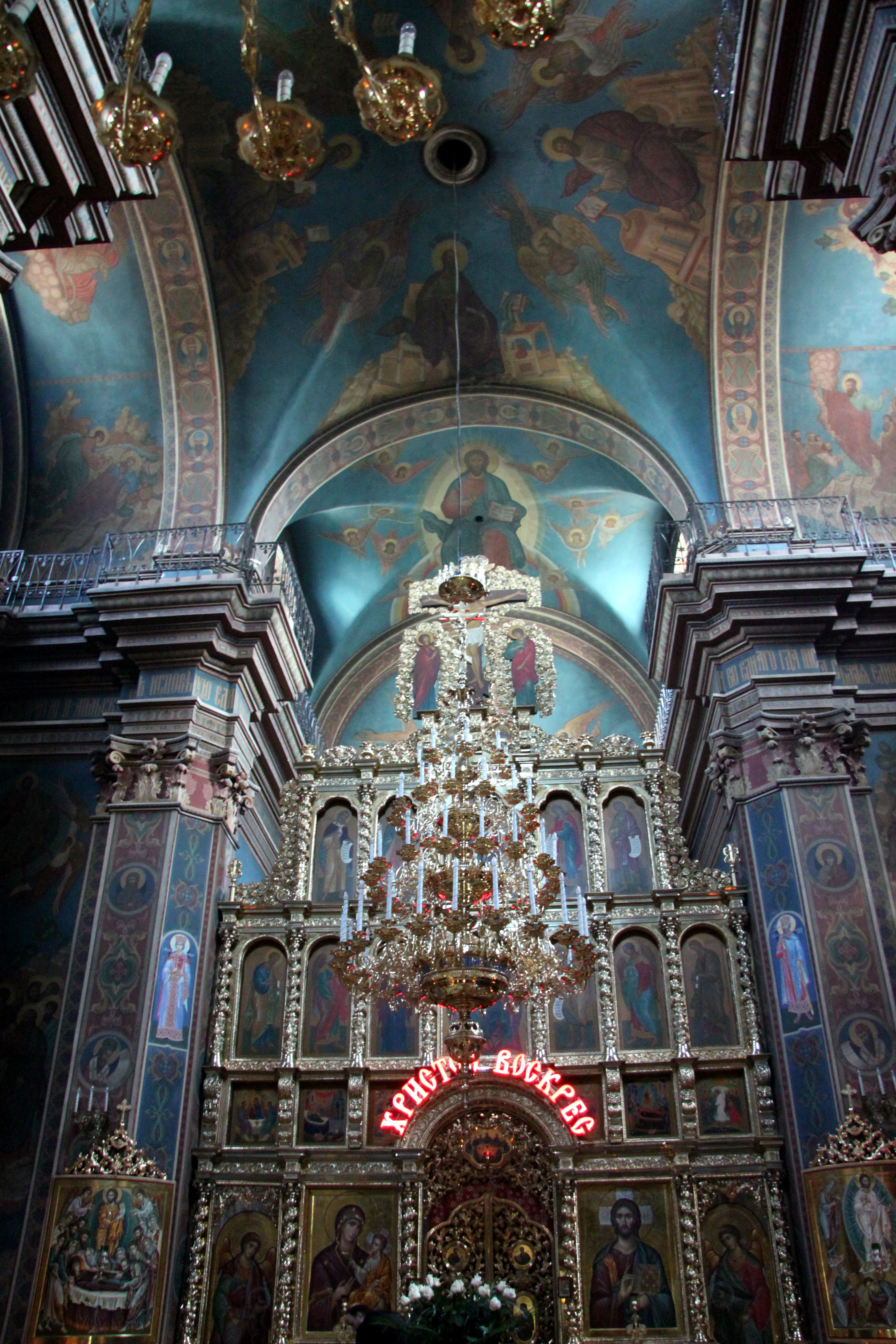 Домініканський монастир - Костьол, вул. Соборна, 23, Вінниця